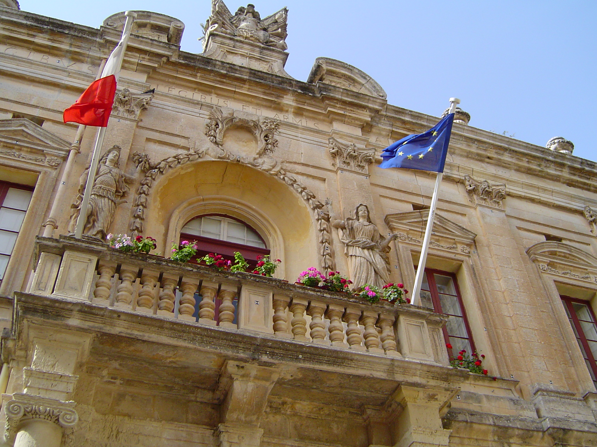 2004 huet Malta mat Stolz den Europafändel gehisst.